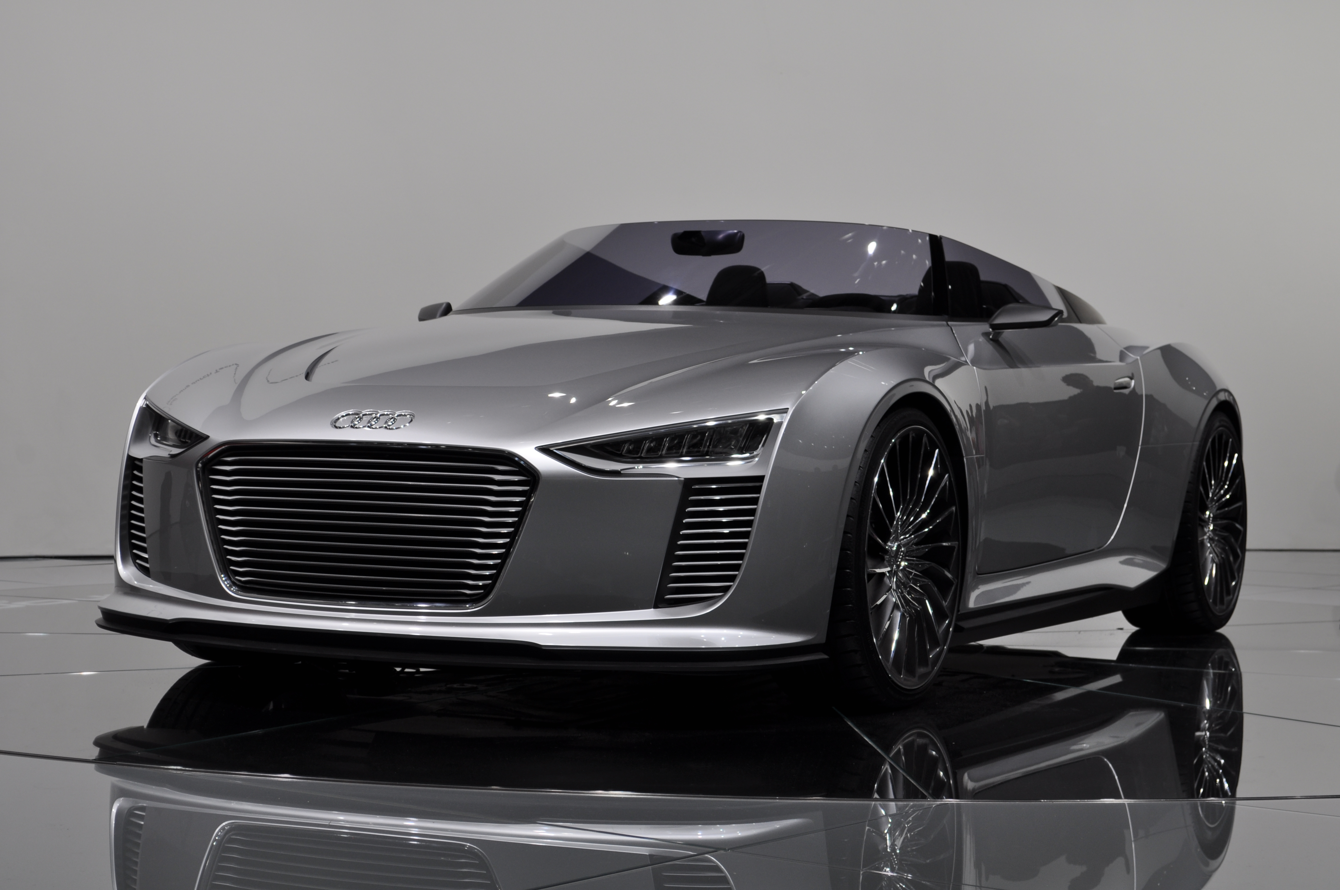 Audi e-tron Spyder au Mondial de l'automobile de Paris